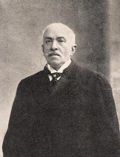 Gravure représentant le docteur Paul Michaux, chirurgien-chef de l'hôpital Beaujon et président de la Fédération gymnastique et sportive des patronages de France.